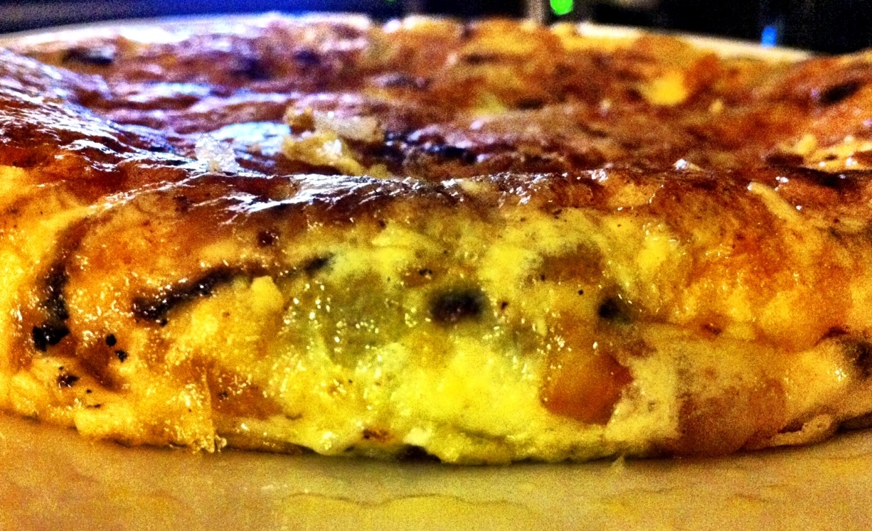 Una variante frecuente de la tortilla española es la tortilla de patata y cebolla